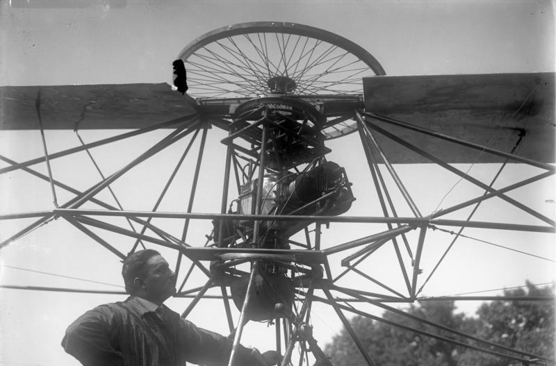 Eine Epoche-machende Erfindung im Flugwesen! Das Rotationsflugzeug, eine neue Erfindung des deutschen Oberingenieurs Zaschka. Das Rotationsflugzeug ermöglicht es infolge seiner rotierenden Tragflächen, senkrecht von der Erde aufzusteigen und genau so wieder zu landen. Die rotierenden Flächen des Rotationsflugzeuges sind in der Mitte mit einem Kreisel, welcher 1400 Umdrehungen in der Minute macht und durch einen luftgekühlten Motor angetrieben wird, verbunden. Der Kreisel hält gleichzeitig die Balance des Rotationsflugzeuges und regelt die Geschwindigkeit desselben. Die Erfindung ist soweit gediehen, dass mit den Probeflügen bald begonnen wird. Der Kreisel des Rotationsflugzeuges, welcher 1400 Umdrehungen in der Minute macht mit s einem luftgekühlten Motor und dem Erfinder desselben, des deutschen Oberingenieurs Zaschka.